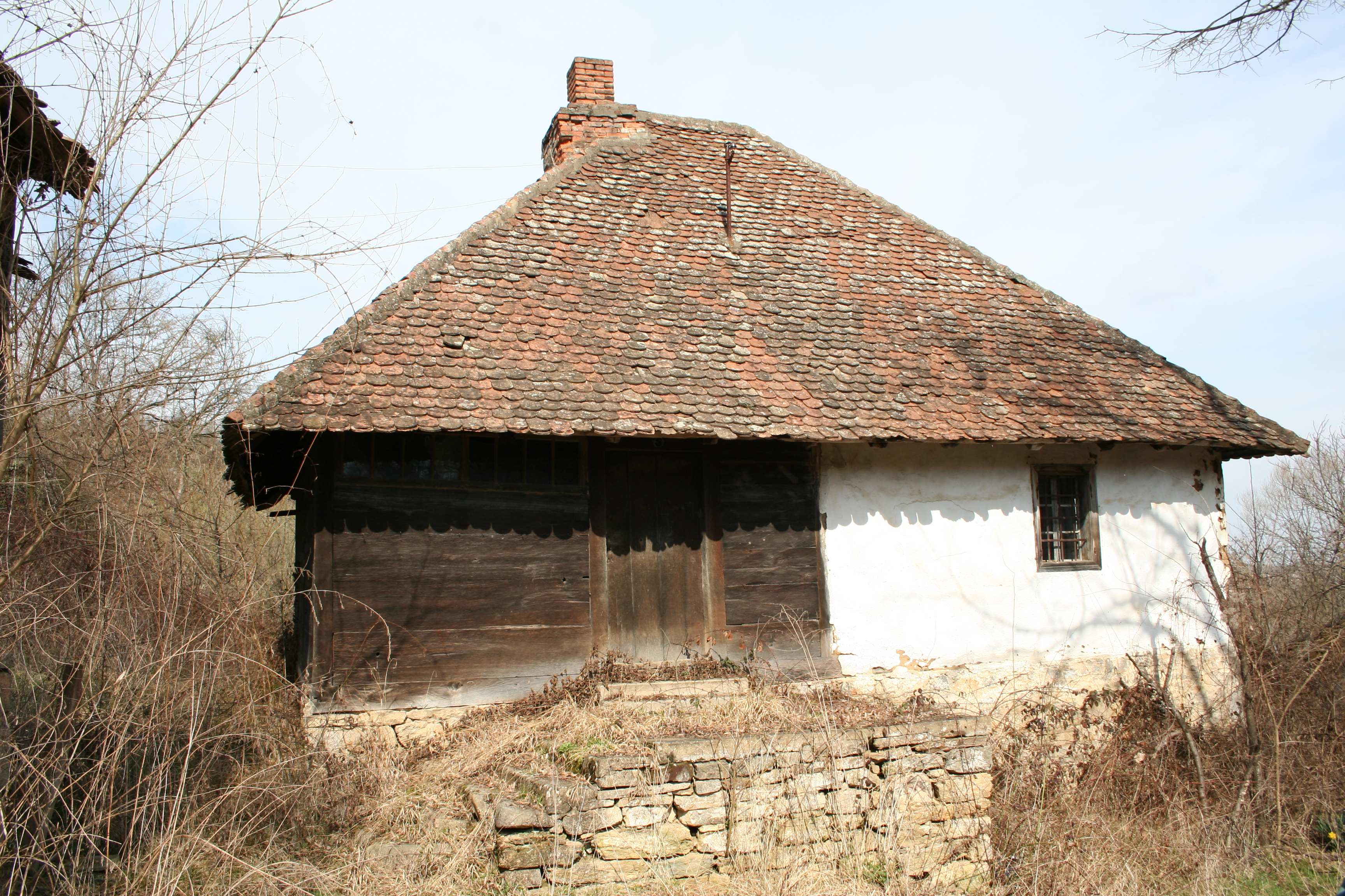 Kuća Radojičića